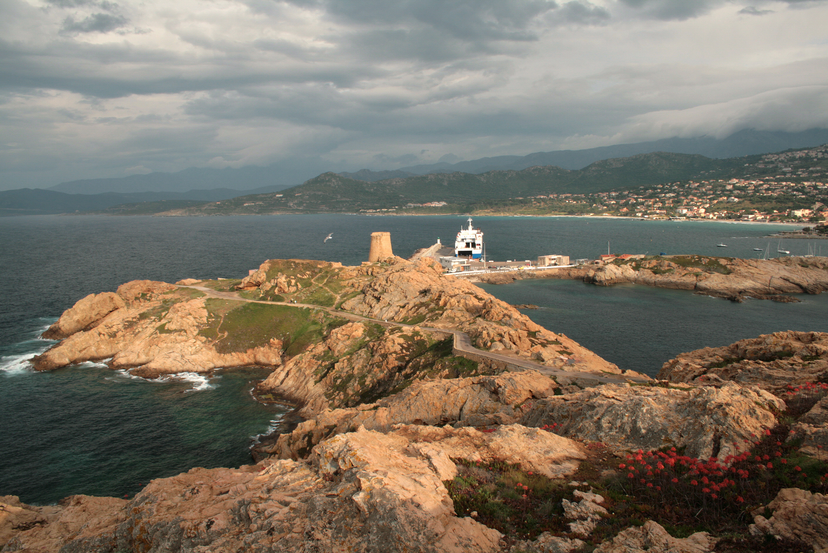 L'Île-Rousse - France - (Haute-Corse), vue du port. Corsu: Isula Rossa - Francia (Corsica suprana), u portu.